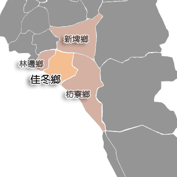 屏東縣佳冬鄉相對位置。